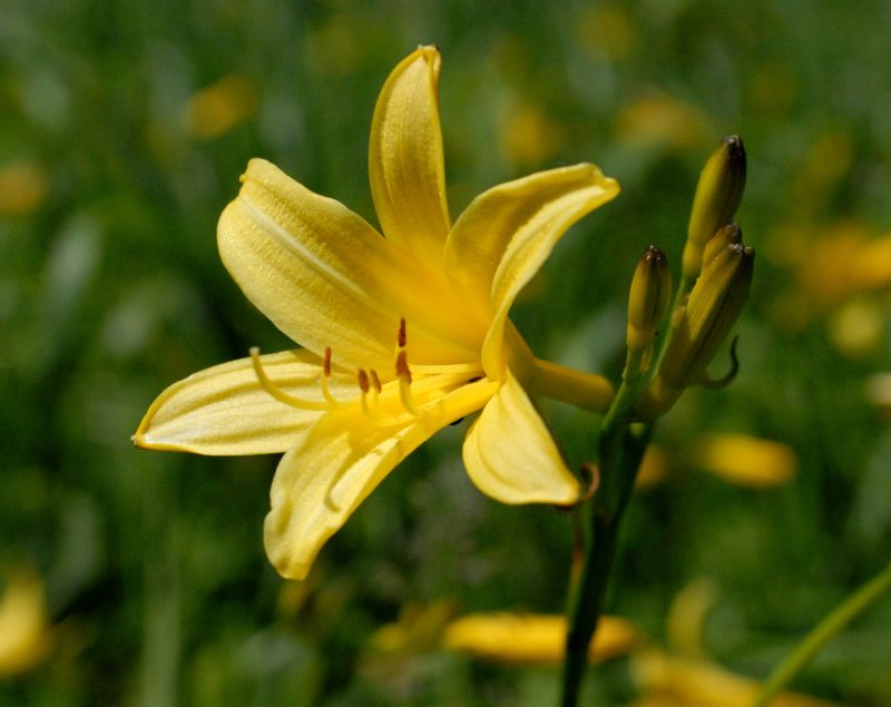 Taglilienblüte (Hemerocallis lilioasphodelus), Taglilienfeld